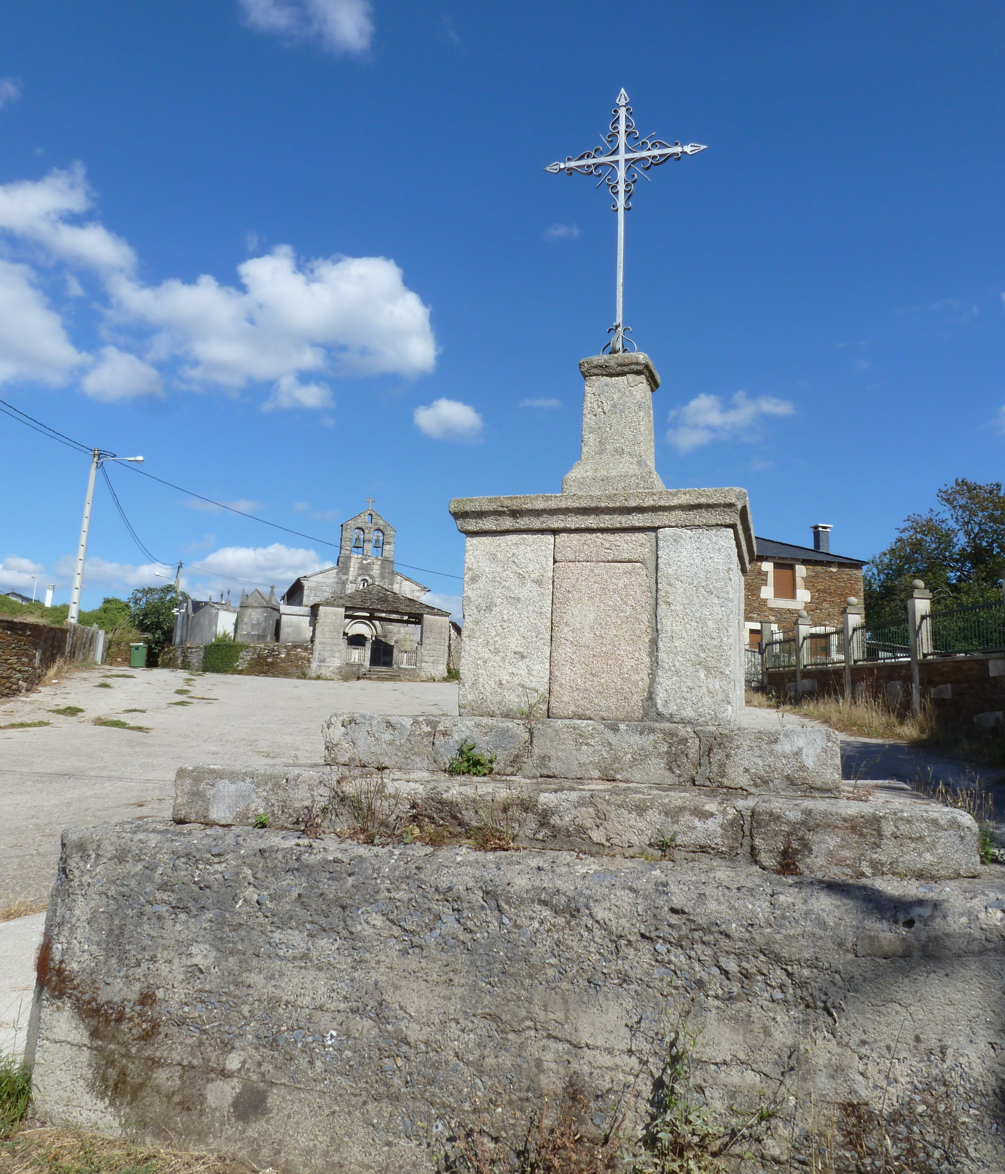 Cruceiro no campo da Cervela, concello do Incio, Lugo